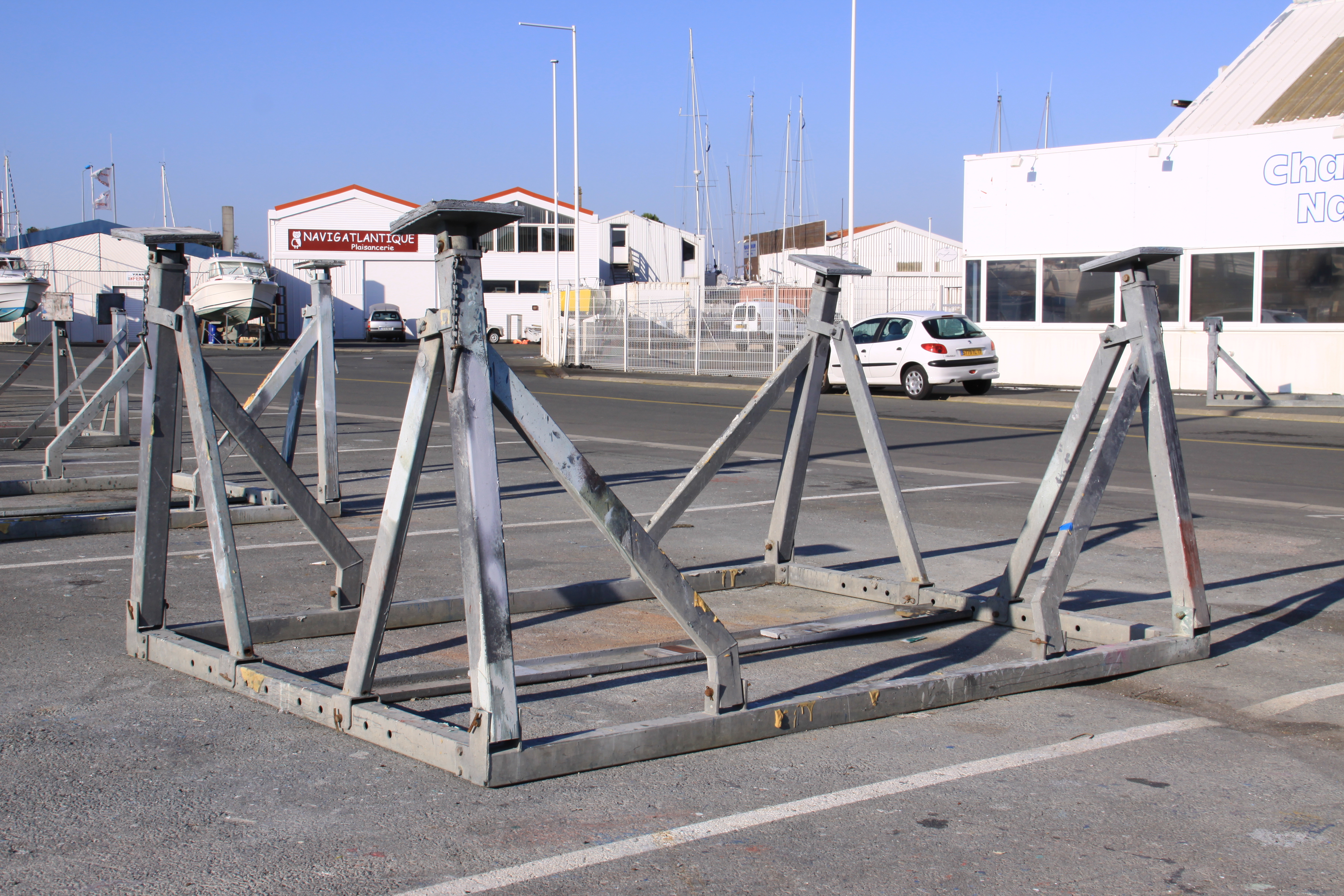 Un ber (berceau) statique utilisé pour l'hivernage, le stockage ou les réparations sur la coque des bateaux de plaisance. La Rochelle (Port de Plaisance des Minimes), Charente Maritime, France.